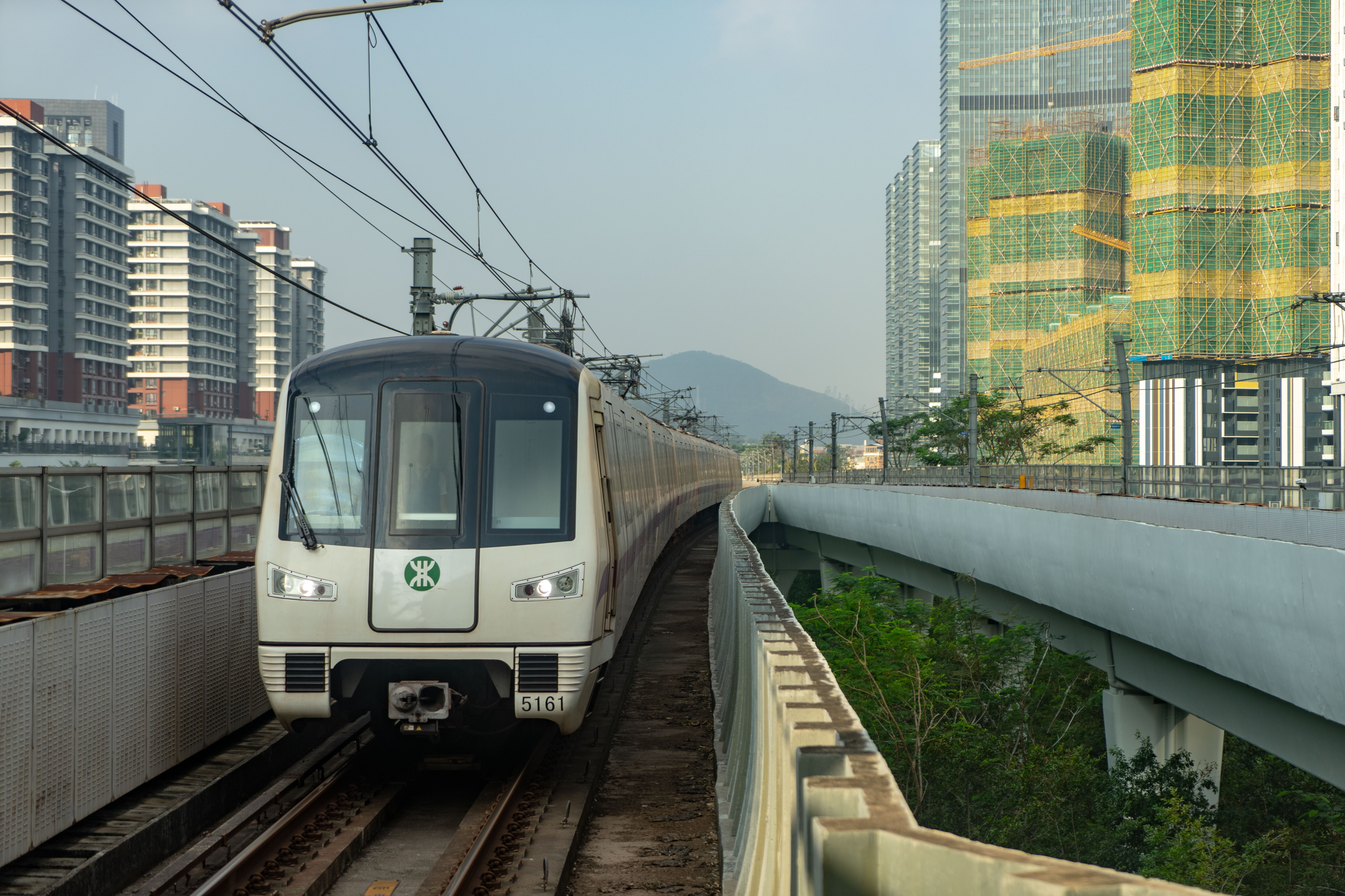 深圳地铁北车长客A型电动列车(5号线)-拍摄于塘朗站